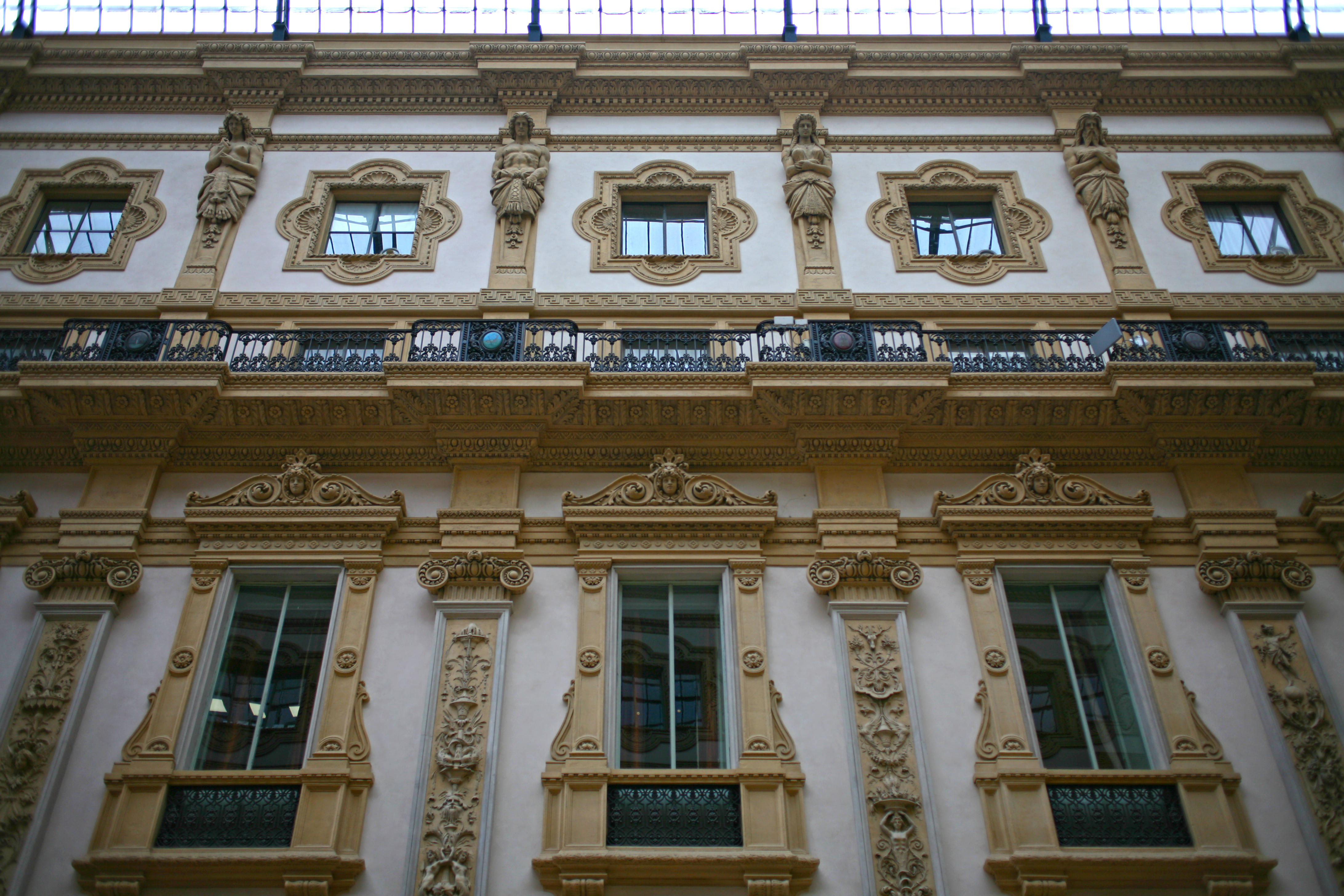 Galleria di Milano, dettagli interno